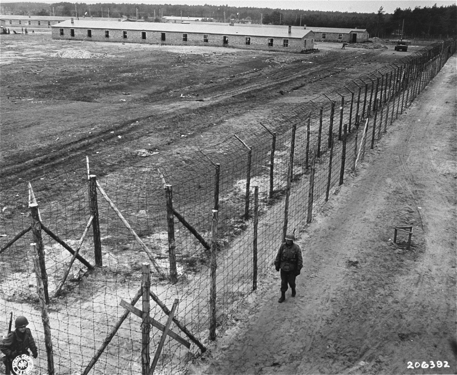 Bewachung des KZ Wöbbelin durch Amerikanische Soldaten